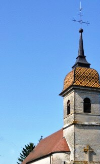 Eglise